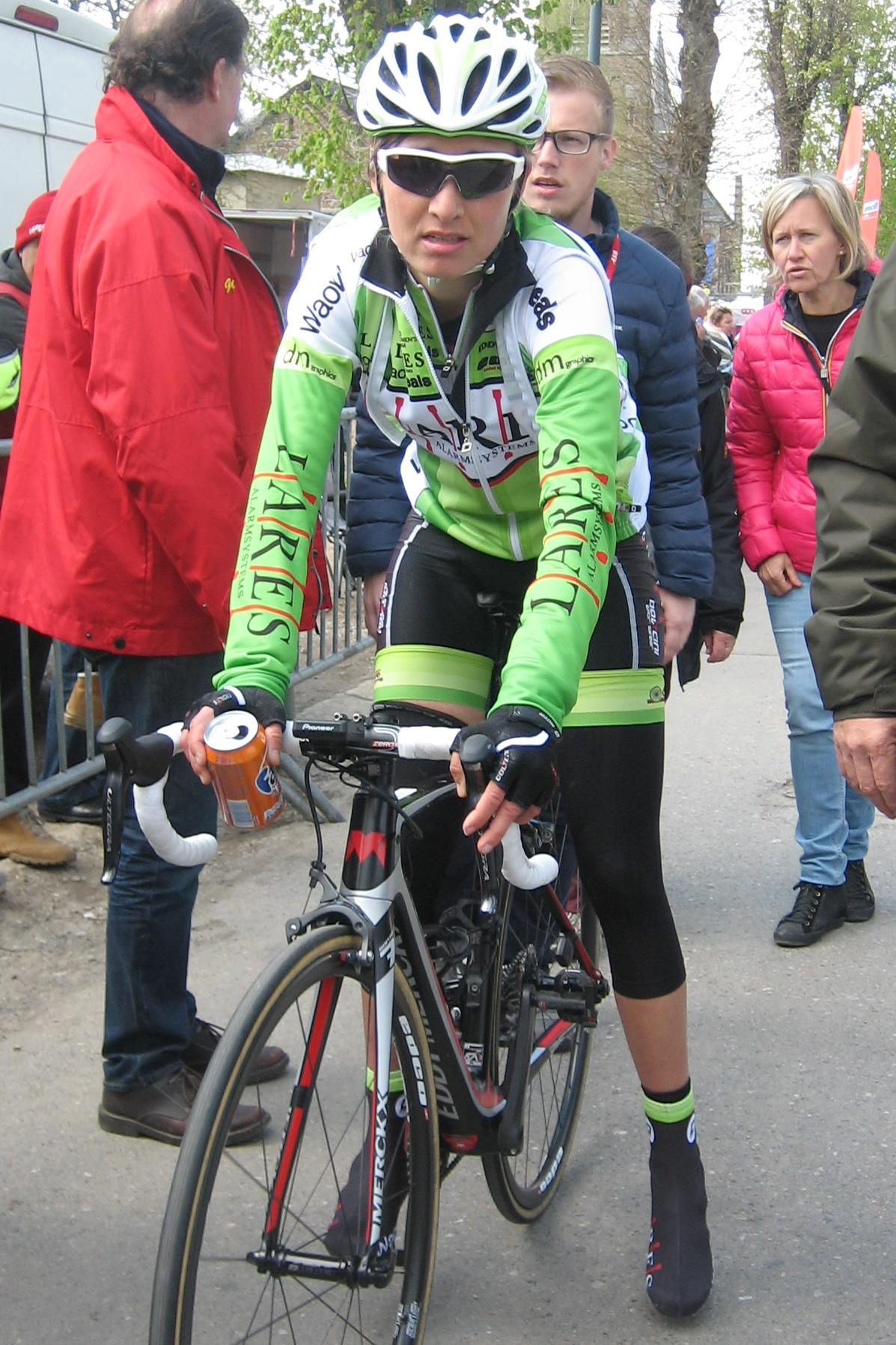 Finish van de Waalse Pijl 2017 in Huy.